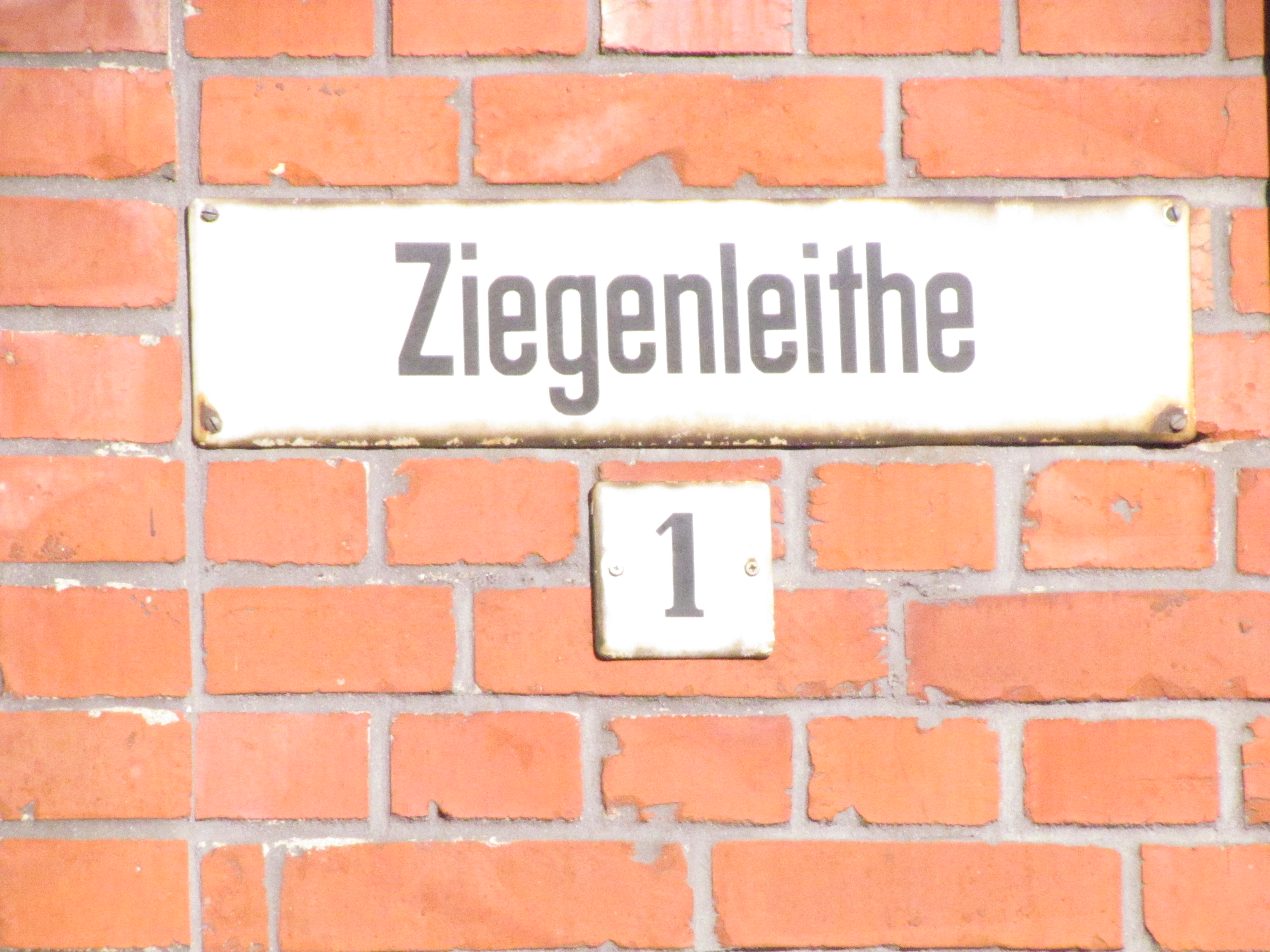 Die Ziegenleithe ist eine Sackgasse, die von der Eibenstocker Straße abgeht und ihr, dabei leicht ansteigend, parallel unterhalb des Webersbergs folgt. Die Ziegenleithe ist eine uralte Bezeichnung, die schon kurz nach der Gründung Schönheides entstanden sein dürfte. Der Begriff Leithe bedeutet Abhang und kommt aus dem bayerisch-ostfränkischen Sprachraum, hängt also vermutlich mit der Besiedlung Schönheides bzw. des Raumes im Bereich von Eibenstock zusammen. Zur Wortbedeutung siehe Friedrich Kluge: Etymologisches Wörterbuch der deutschen Sprache, 10. Aufl., Berlin und Leipzig 1924, Seite 3. Ganz bildlich kann man sich die Entstehung des Straßennamens vorstellen: Ziegen beweideten den steilen, an einigen Stellen felsigen Abhang des Webersberges. An diesem Abhang, der Ziegen-Leithe werden im Zuge des weiteren Fortgangs derBesiedlung Schönheides Häuser entstanden sein, nicht zu nahe am Filzbach wegen der damit verbundenen Überschwemmungsgefahr. Die Eibenstocker Straße entstand übrigens erst Ende des 19./Anfang des 20. Jahrhunderts.